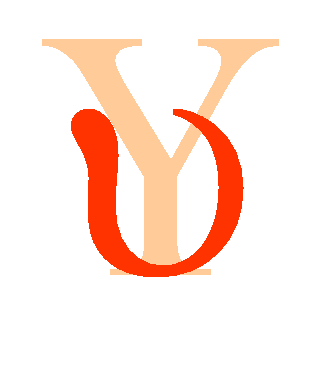 Greek letter